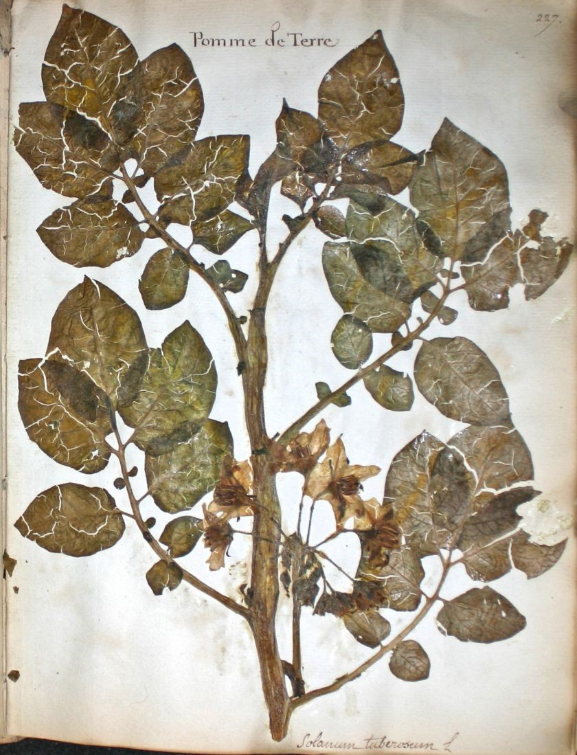 Extrait de l'herbier de Jacques Raige-Delorme fin du XIX